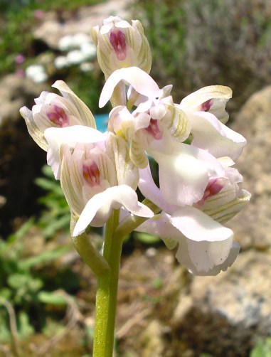 Orchis morio (Anacamptis morio), au jardin alpin (Jardin des Plantes Paris).